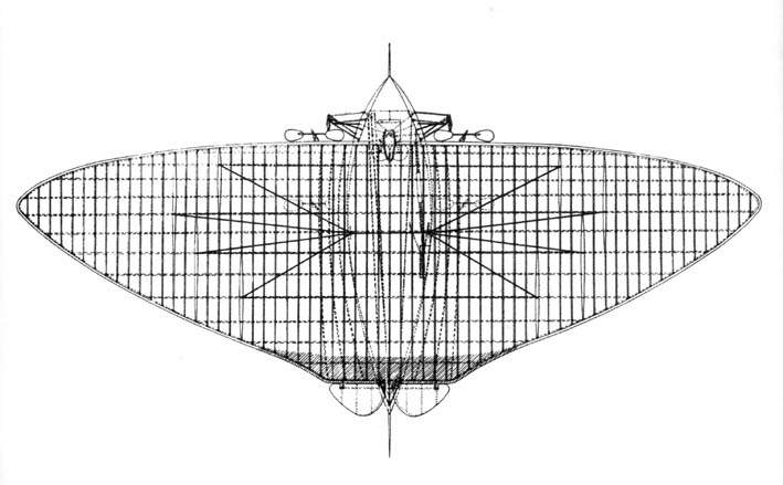 Entwurfszeichnung des ersten Nurflüglers von Alphonse Pénaud und Paul Gauchot; Patent angemeldet 1876